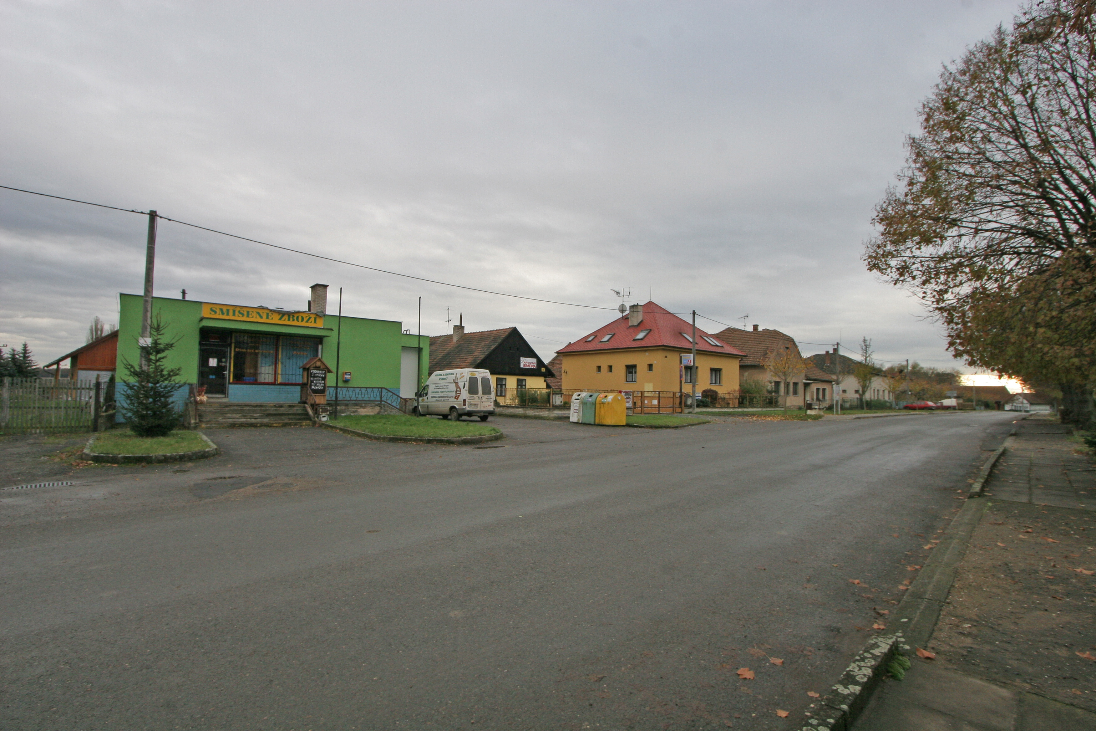 Podoliby - obchod